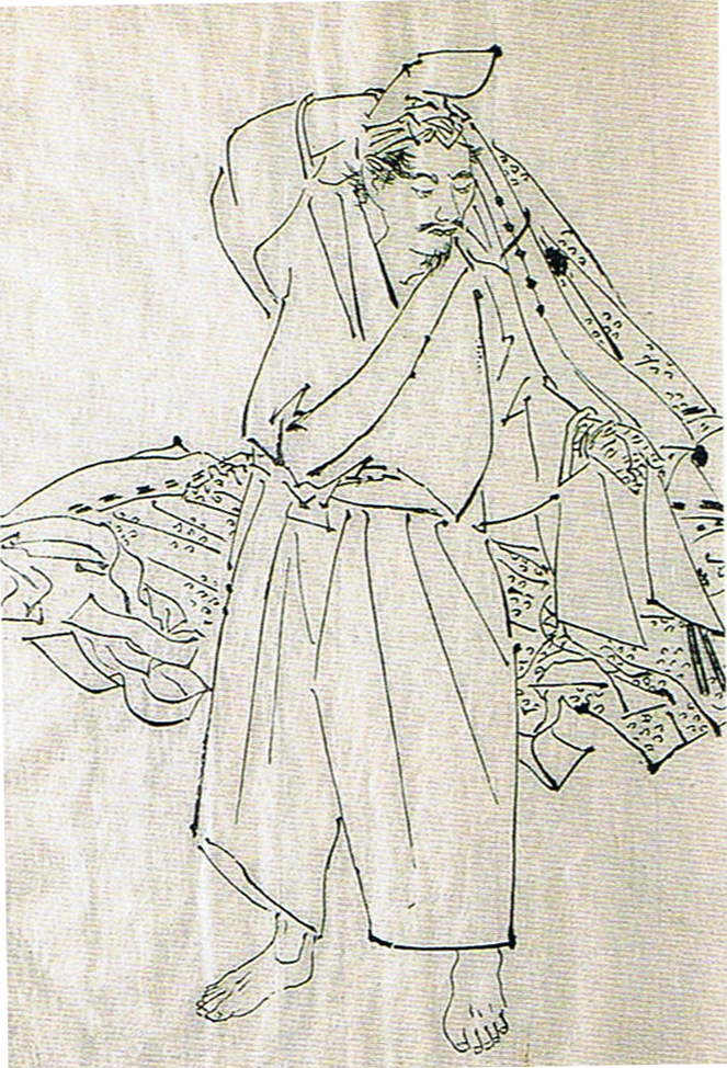 三浦義澄像。『前賢故実』金沢美術工芸大学所蔵。